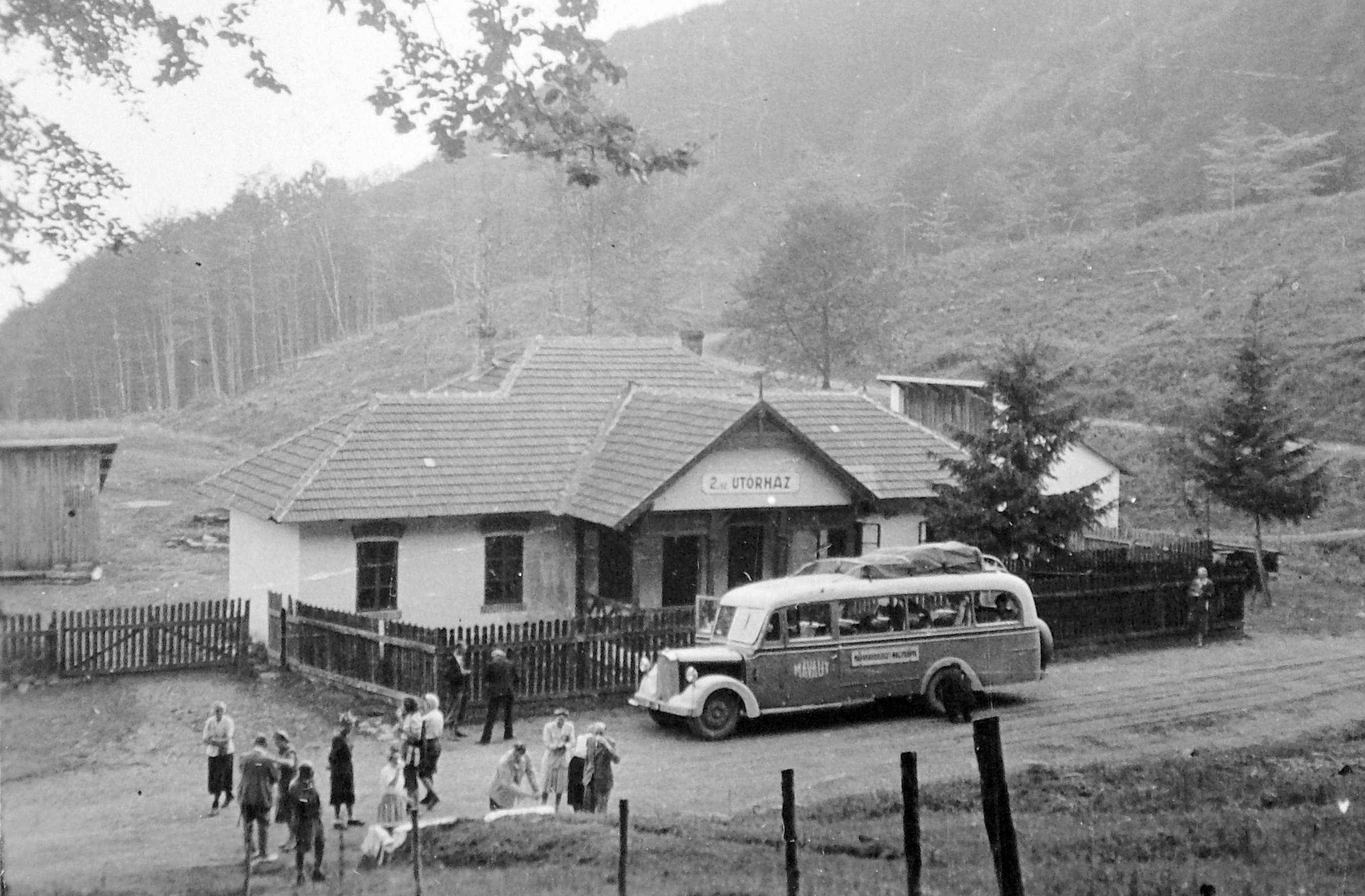 útőrház a Máramarossziget felé vezető út mellett, a Gutin-hágó közelében. Location: Romania, Transylvania, Baia Mare Tags: picture, bus, MÁVAG-brand, Hungarian brand, MÁVAUT-organisation, genre painting, companionship, lath fence, woods Title: útőrház a Máramarossziget felé vezető út mellett, a Gutin-hágó közelében.